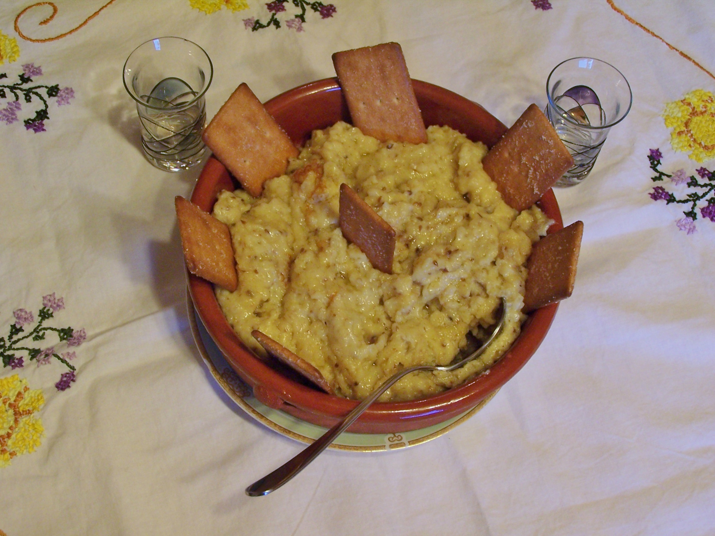 Gachas de matalauva. Postre, merienda casero según receta de Lanjarón (Granada) y Alpujarra Granadina.